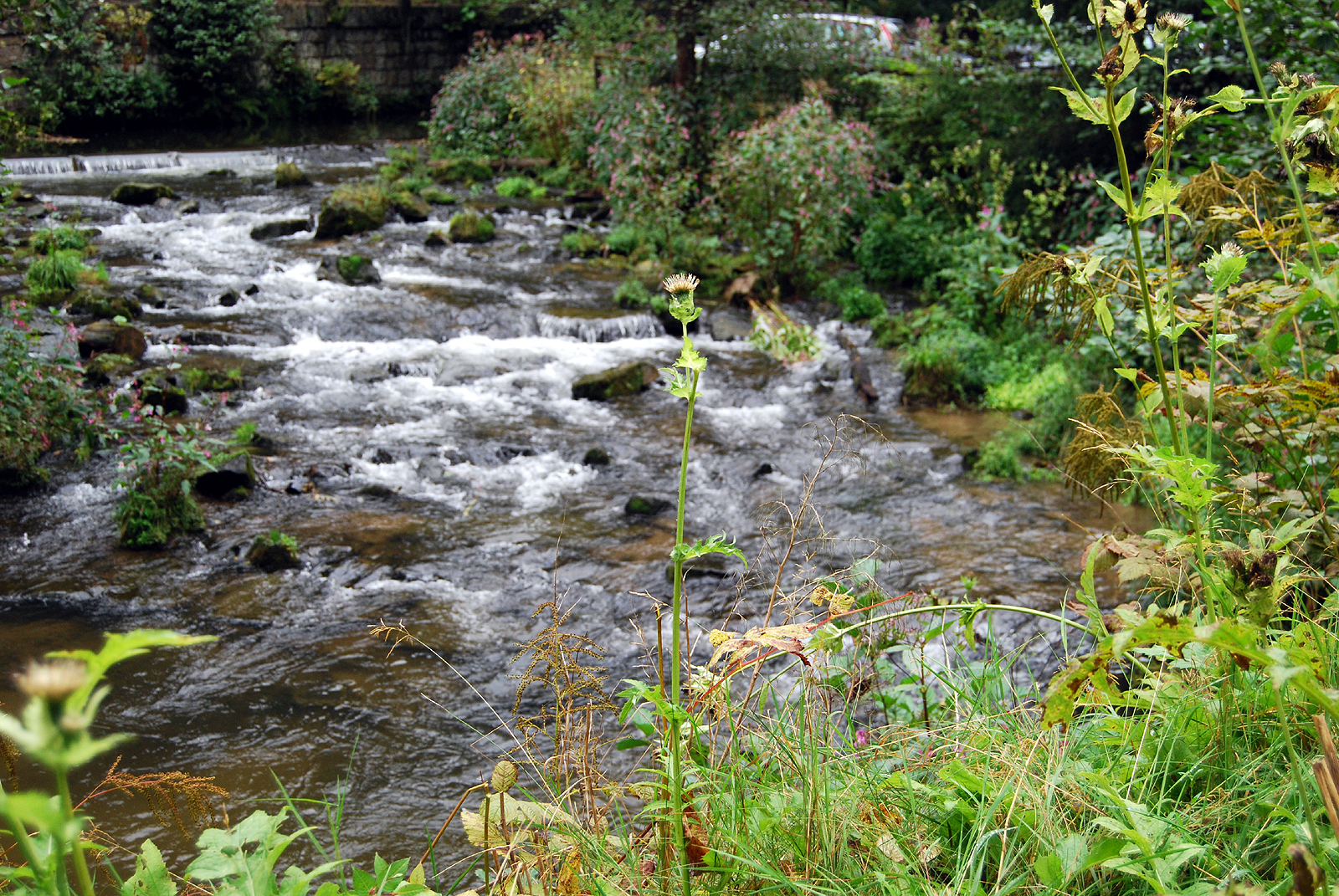 Kirnitzsch an der Neumannmühle, hintere Sächsische Schweiz